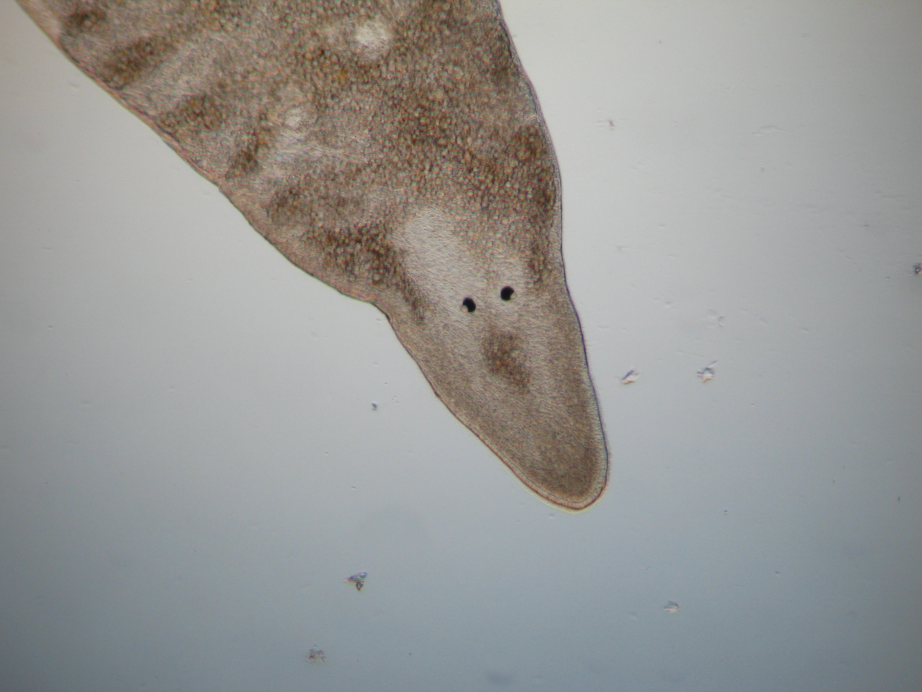 Marine triclad (Maricola) from the island of Sardinia, in clean sands of the La Maddalena archipelago.